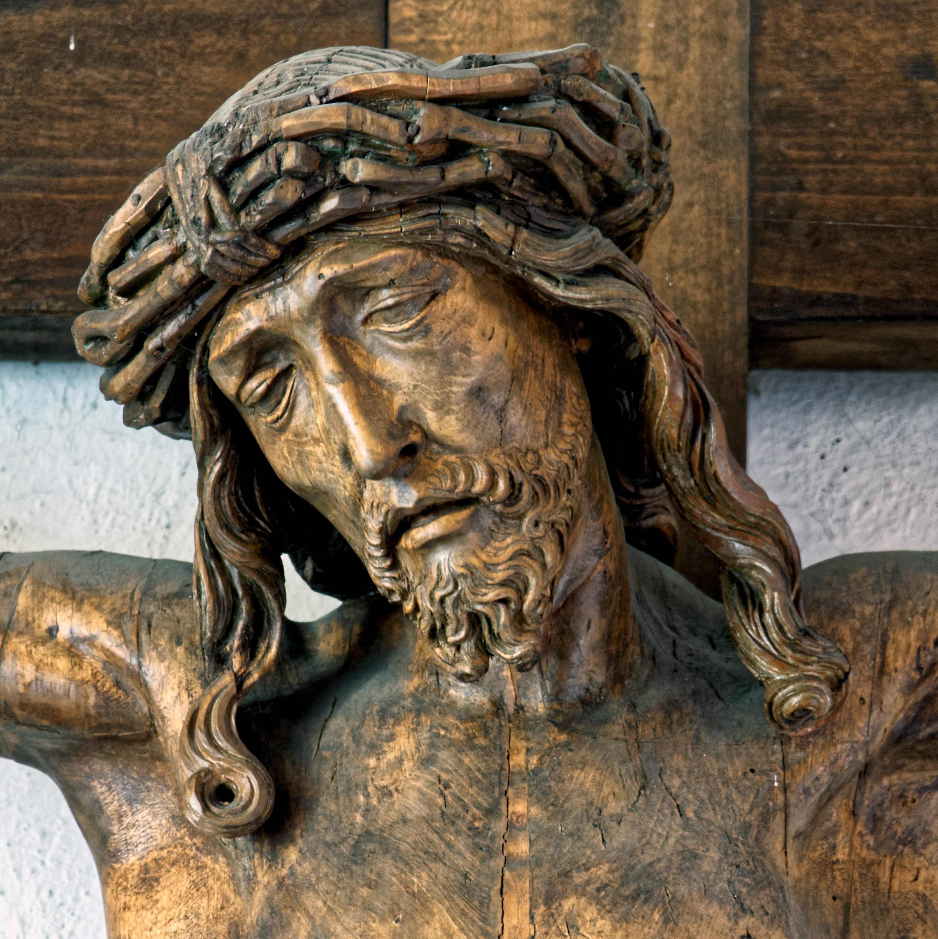 Die Triumphkreuzgruppe Tilman Riemenschneiders in der Stadtpfarrkirche Mariä Himmelfahrt Aub.